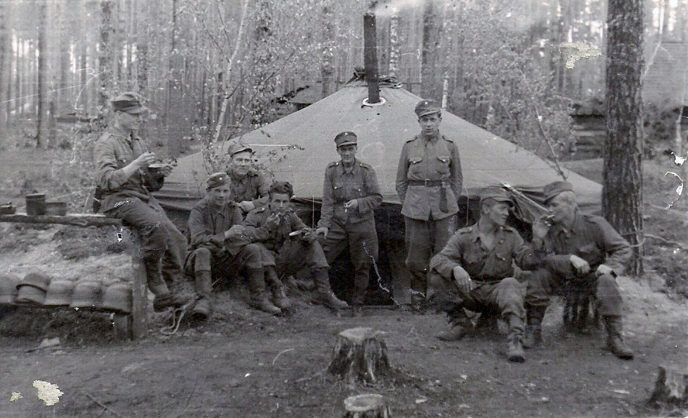 Rajajääkäripataljoona 4, sen kolmannen joukkueen miehistöä. Taisteli Syvärin Pertjärvellä vuonna 1942. Muut taistelu- ja olinpaikat Itä-Karjalassa Kolankylä, Verondajoki, Tokkari, Niidenjoki, Salmi, Tulemajoki, Kannikangas, Joutsenperänkangas, Kobra, Kivijärvi ja Šemeikka.